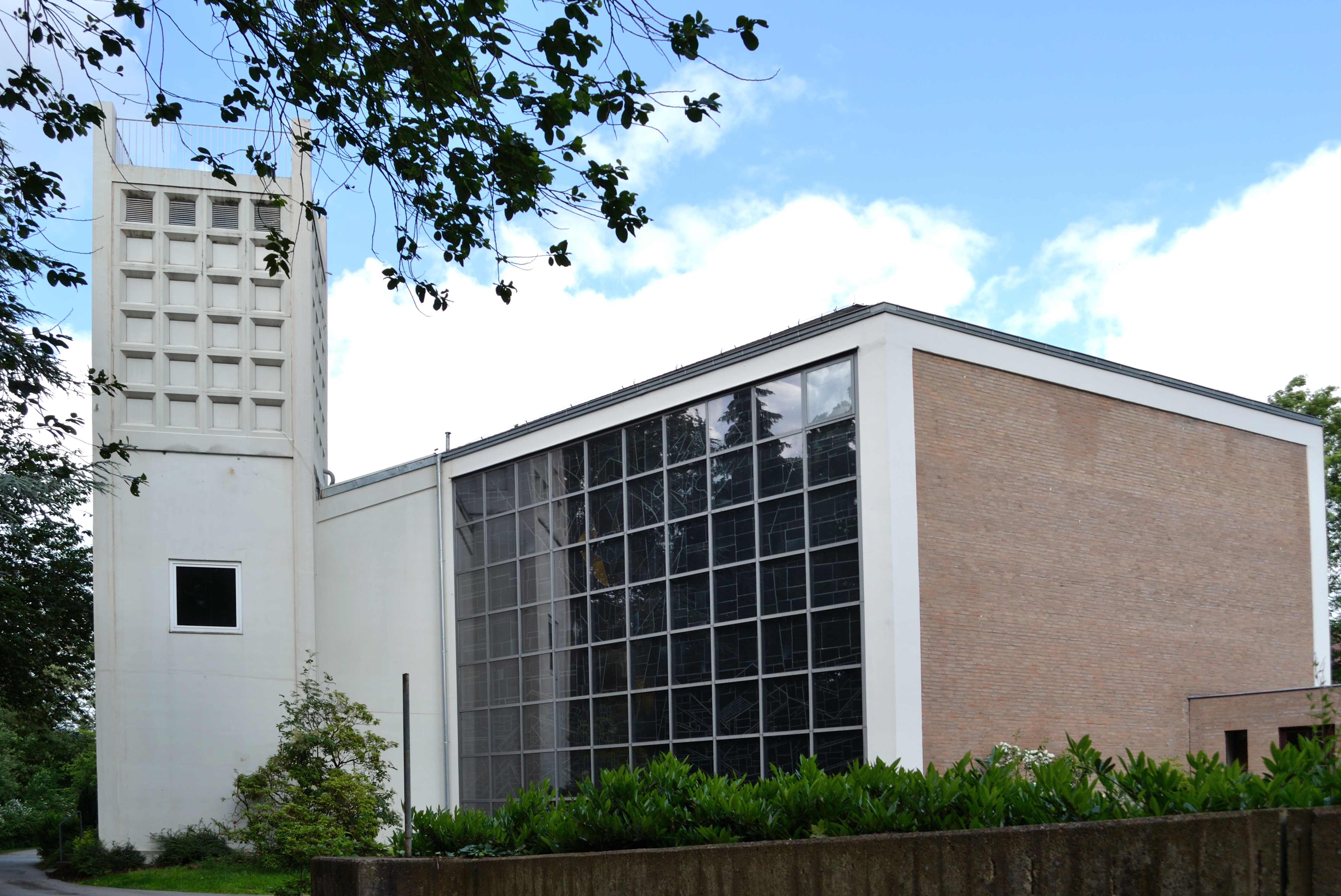 Evangelisch-lutherische Kirche St. Michael in Detmold/Hiddesen